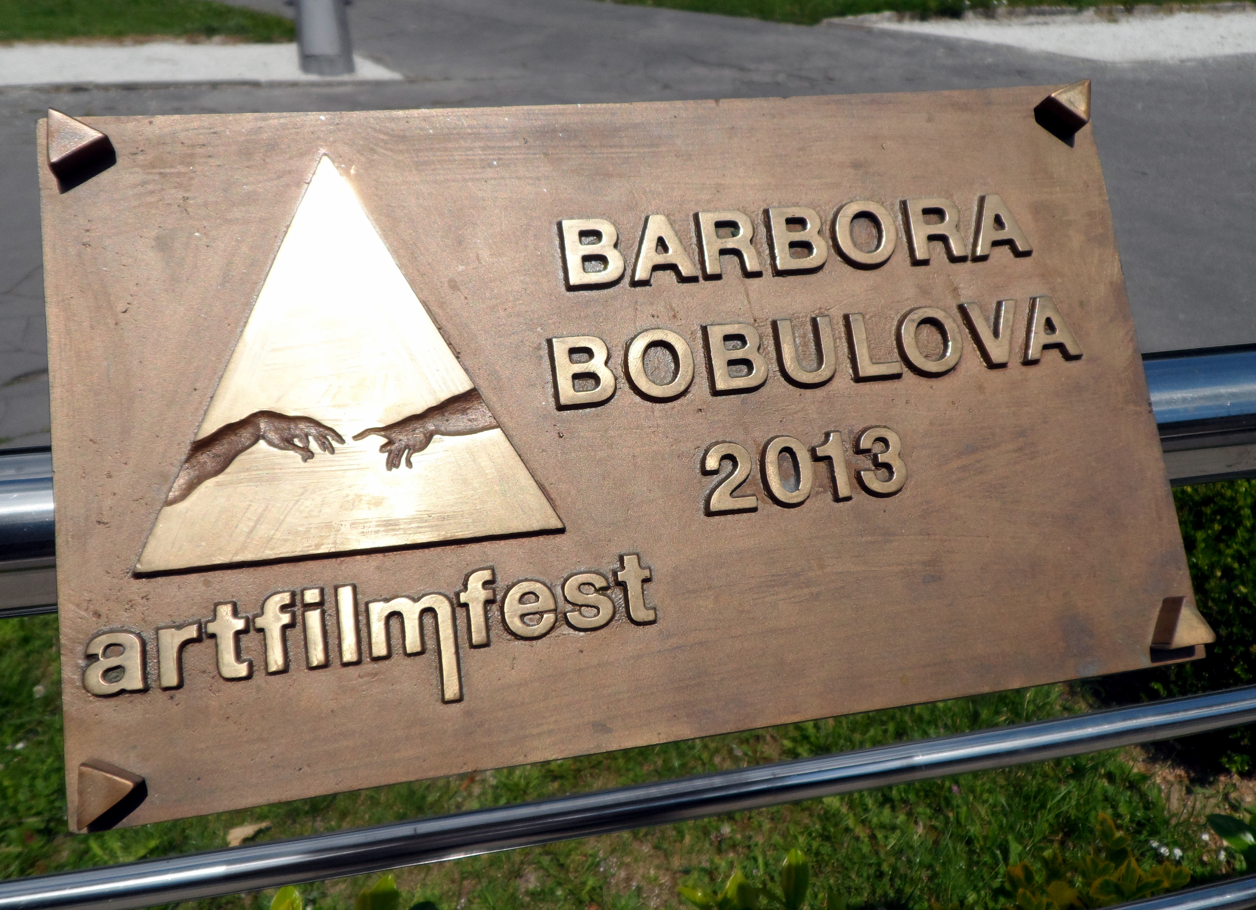 Mosadzná plaketa: „HERCOVA MISIA“ (Actor‘s Mission Award). Medzinárodný filmový festival Art Film Fest, Trenčianske Teplice 2013